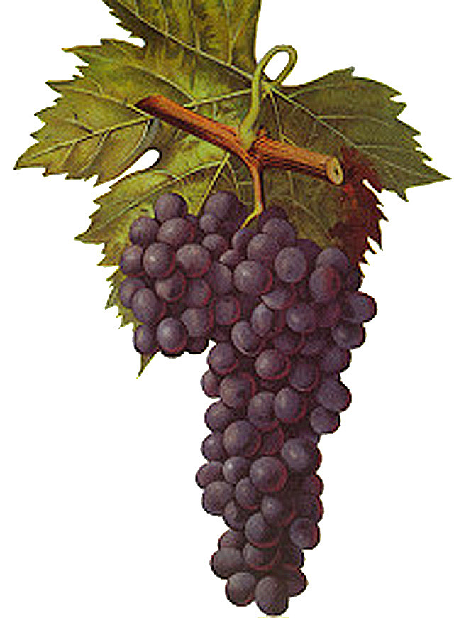 Grappe de Nielluccio par Viala et Vermorel